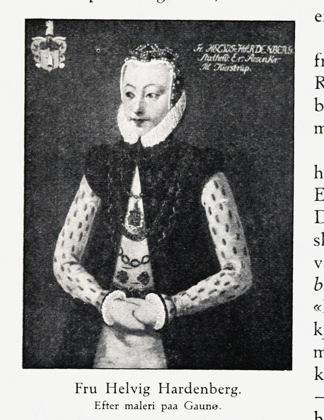 Fru Helvig Hardenberg. Efter maleri på Gaunø. Illustrasjon hentet fra boken "Svanøen i Søndfjord" av Schou, Alhed og utgitt av Aschehoug (Kristiania, 1912)